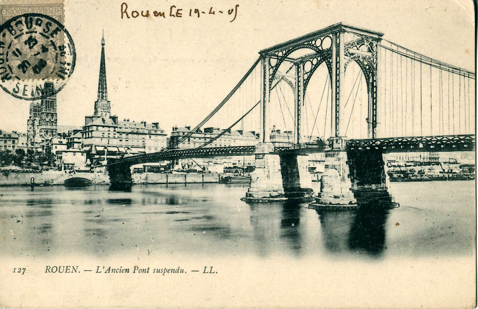 Carte postale ancienne éditée par LL, n°127 :ROUEN - L'ancien Pont suspendu